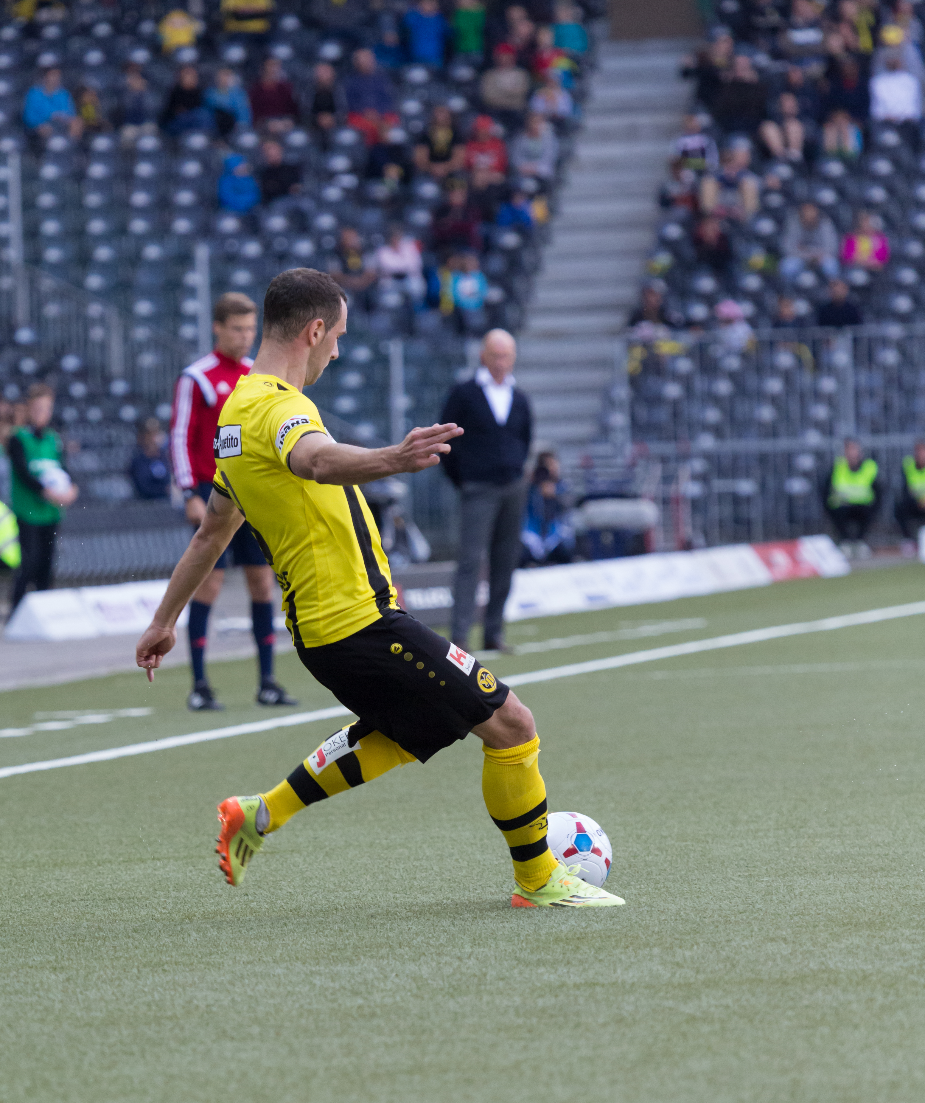 Freistoss von Jan Lecjaks beim Spiel des BSC Young Boys gegen den FC Luzern